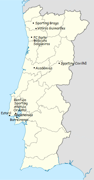 Carte des clubs participants du championnat du portugal de football de première division 1951-1952